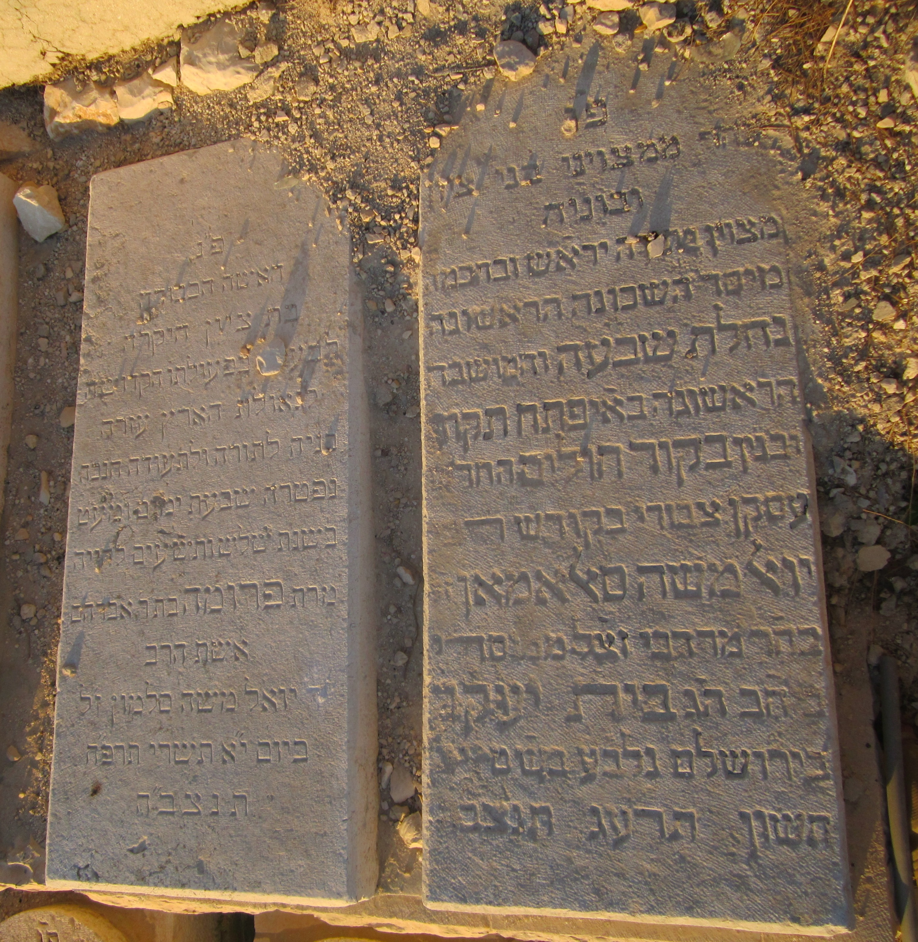 קבר הרב יואל משה סלומון ורעייתו בהר הזיתים